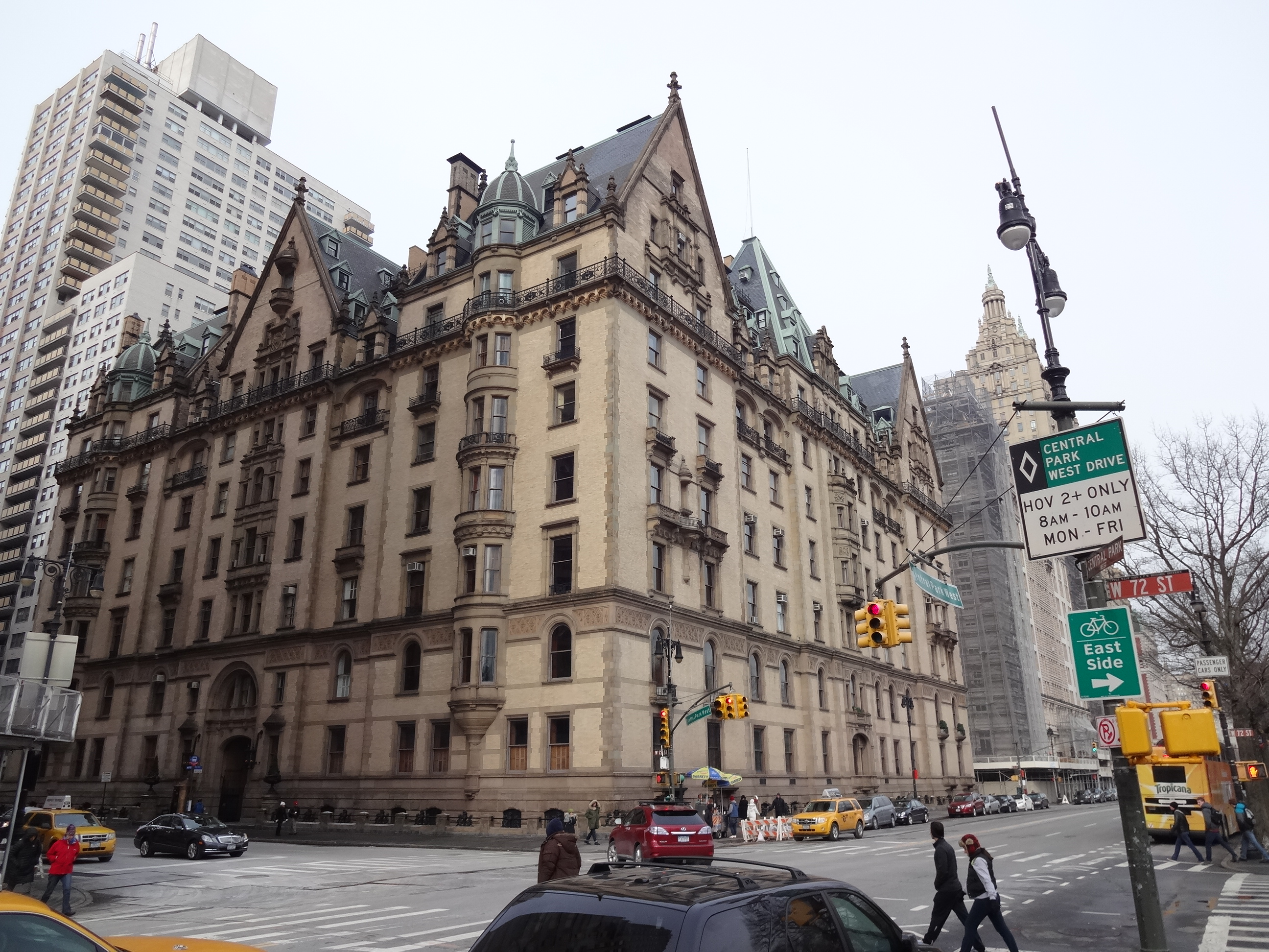 Edifício Dakota.